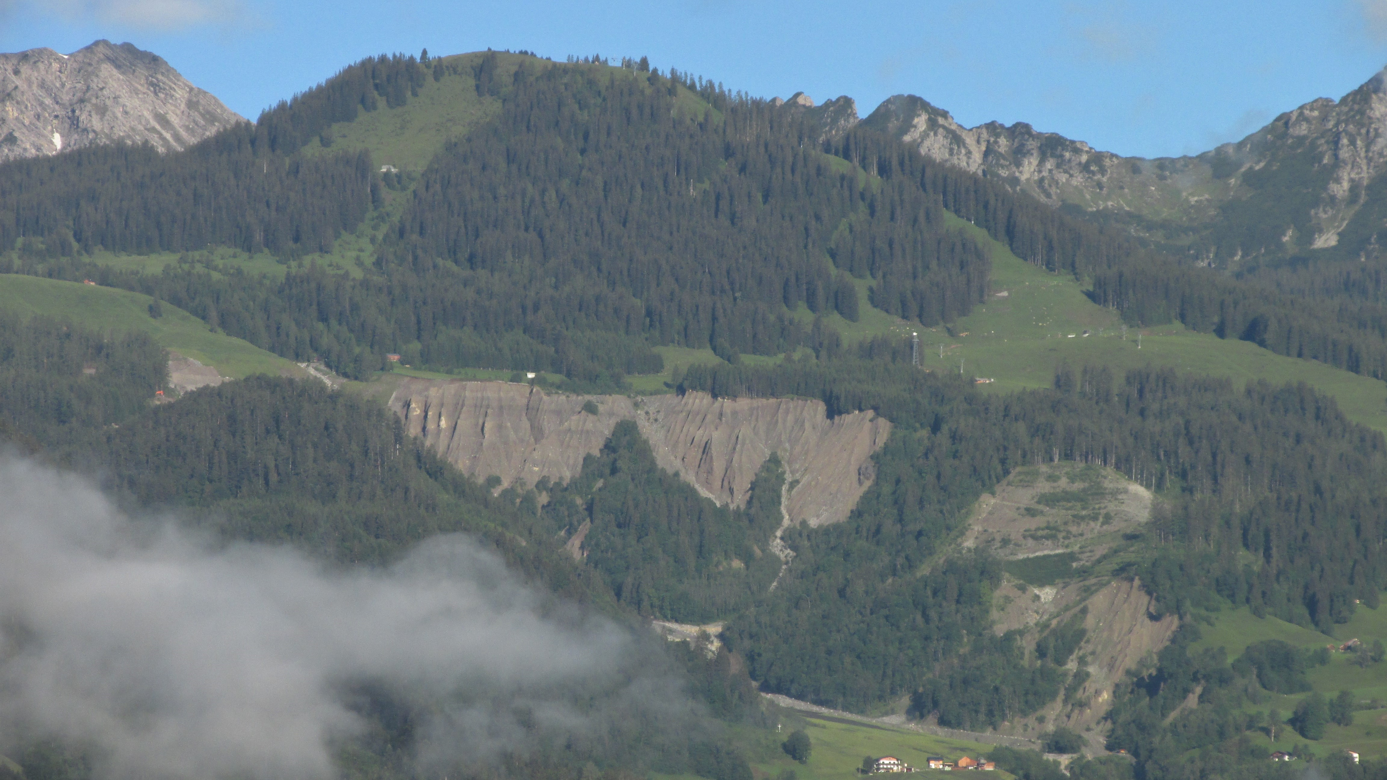 Blick von Osten aufs Schesatobel mit dem Loischkopf (1809 m) darüber